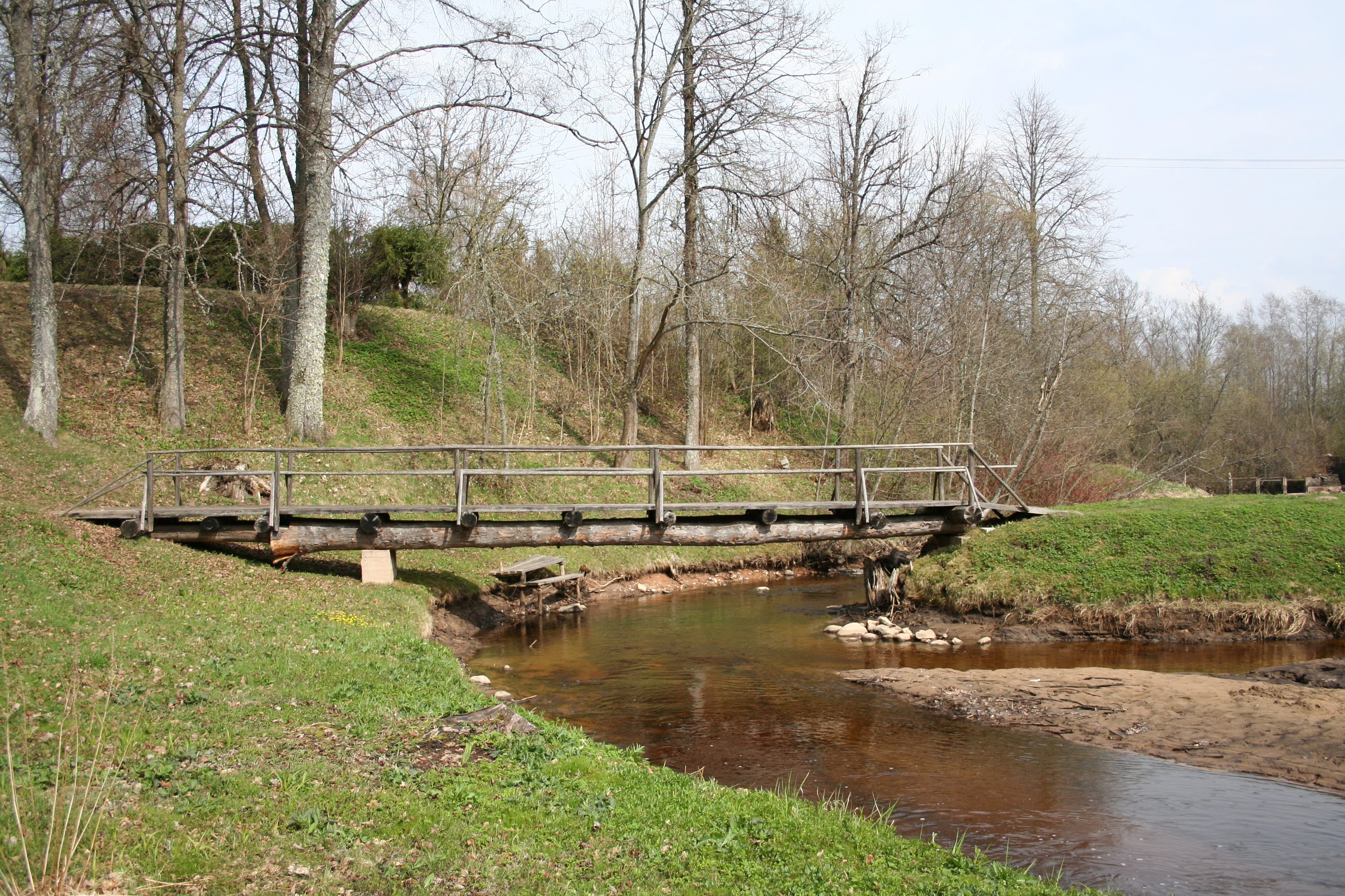 Põlva Talurahvamuuseum, sild üle Piigaste oja